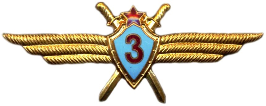 Нагрудный знак классной квалификации "Военный летчик 3-го класса"